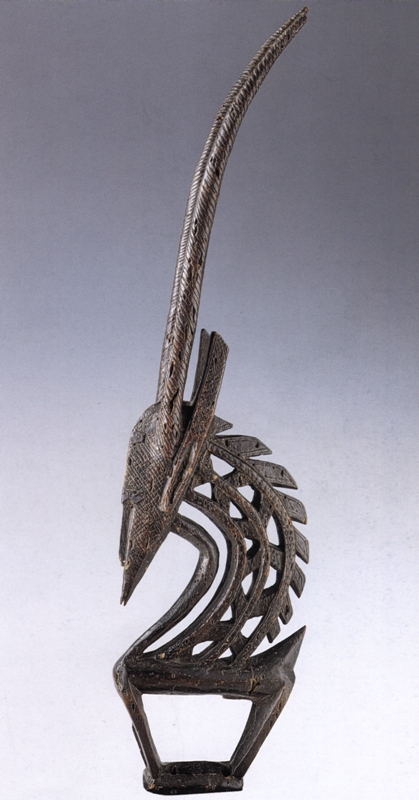 MASCHERA CIMIERO CIWARA - La scultura lignea zoomorfa era in orgine completata da una calottina che viene fissata alla testa del danzatore. La figura è quella dell'antilope cavallina maschio (pene). Busto e zampe rivolte verso l'interno disegnano una forma trapezoidale; l'enfasi cade sulla verticalità della figura: il lungo collo traforato con criniera, il muso che presenta l'incrocio ad angolo retto fra naso e arcata sopraccigliare tipico dello stile bamana, le lunghe corna curvate all'indietro, tutte parti che sono valorizzate con incisioni a motivi geometrici lineari. Le maschere della società ciwara presiedevano ai culti dei campi incoraggiando i contadini nel lavoro e mettendoli in competizione fra loro. Ciwara celebra il sole e i suoi effetti benefici sulla terra. La zappa del contadino così come il sole feconda la terra e la rende produttiva. Diversamente da altre società iniziatiche bamana, quella ciwara consente una certa partecipazione anche alle donne. Se a portare le maschere di questa società maschile sono sempre uomini, le donne possono però partecipare a una parte dei riti e mangiare la carne dei sacrifici (Colleyn 1998). Le maschere danzano in coppie formate da un'antilope mashio e da una femmina. Talora però, in certe zone, la figura rappresentata costituisce un assemblaggio di diversi animali: antilope, pangolino, oritteropo, faraona. Secondo D. Zahan (1980) il busto assimila l'antilope al cavallo, unico fra gli animali domestici a essere legato al cielo e alla pioggia che rende fertile la terra. La parte traforata rimanda simbolicamente al zigzagare dell'antilope e ai raggi solari, mentre la curvatura della schiena è quella della volta celeste lungo cui il sole sale e scende, della fatica del lavoro che piega la schiena e dei figli che si lasciano dietro di sé. Le corna alludono infine alla spinta verso l'alto dei vegetali e sono quindi simbolo di fertilità.